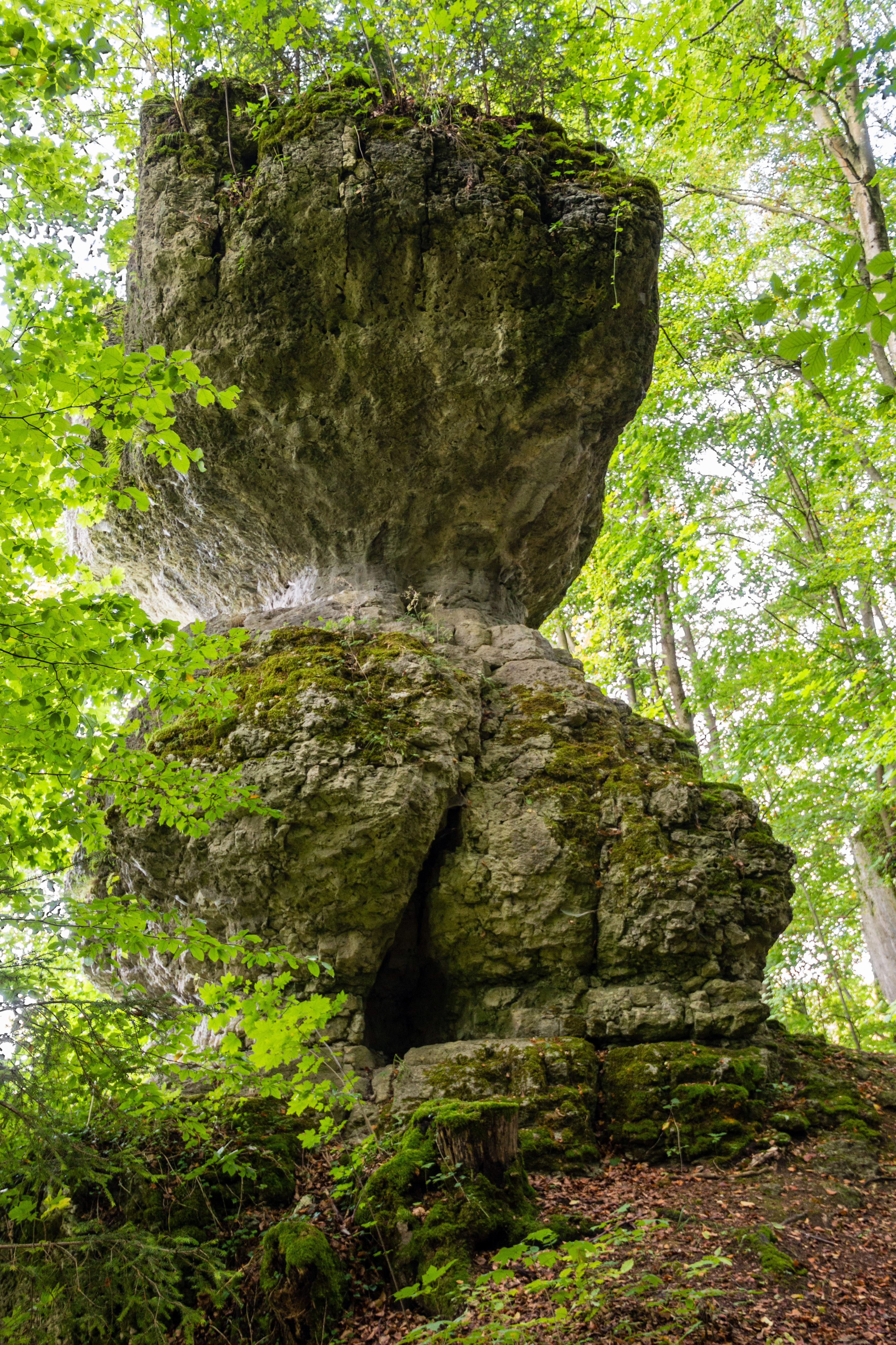 Knopfstein, Obertrubach, Geotop und Naturdenkmal